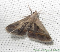 Acantholipes trimeni